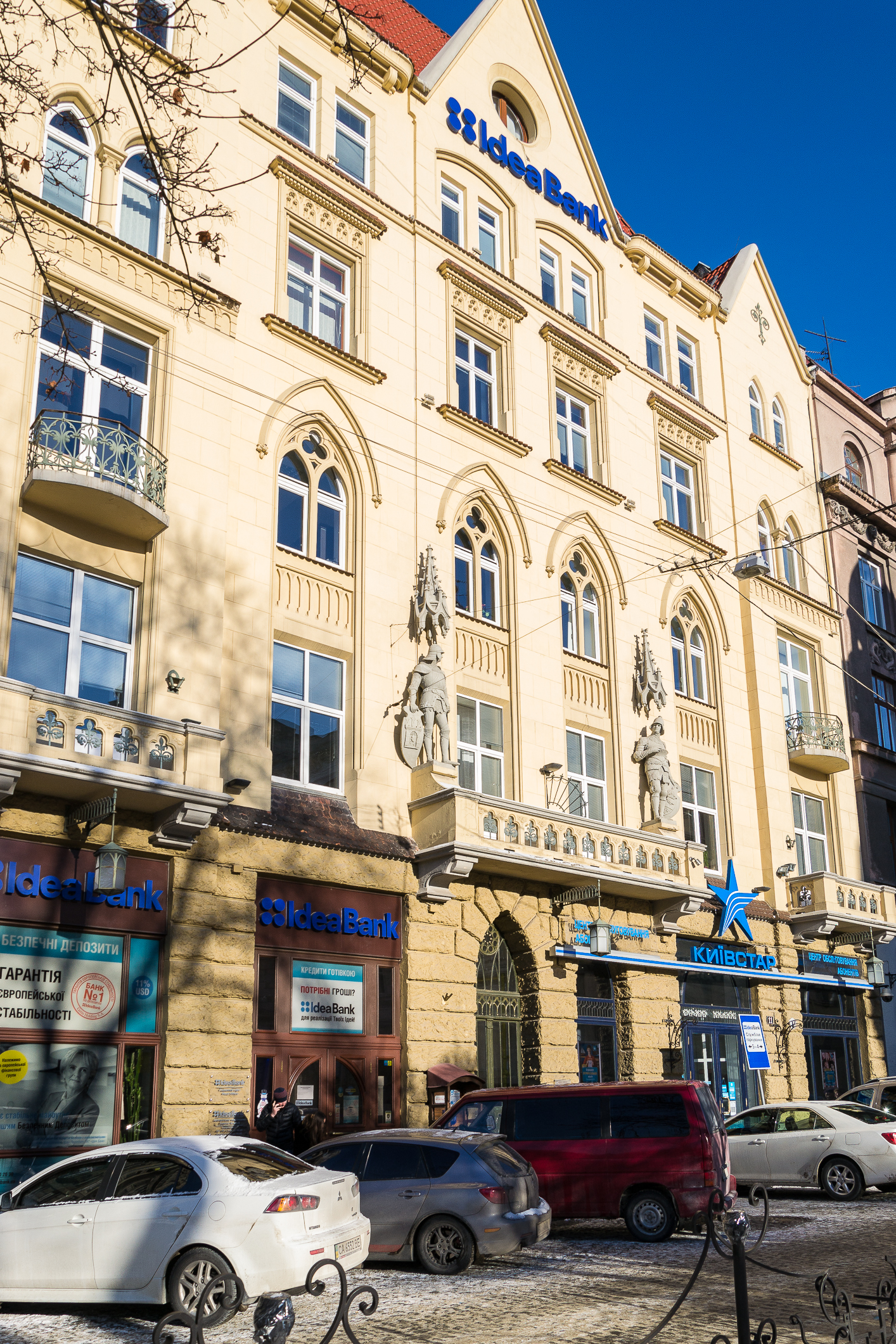 житловий будинок, Львів, Валова, 11